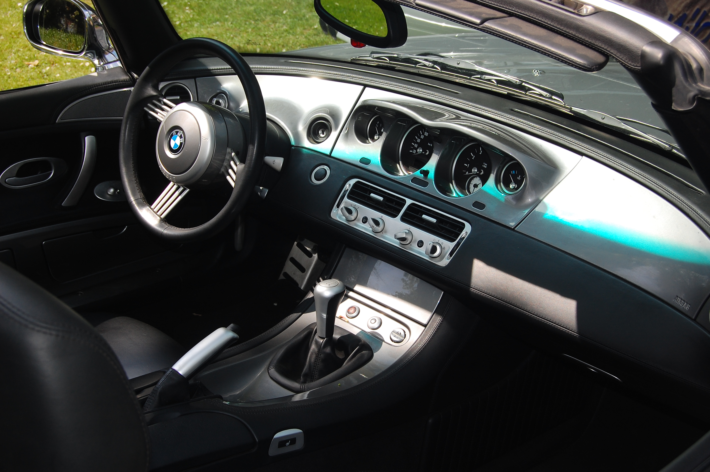 Interieur eines BMW Z8